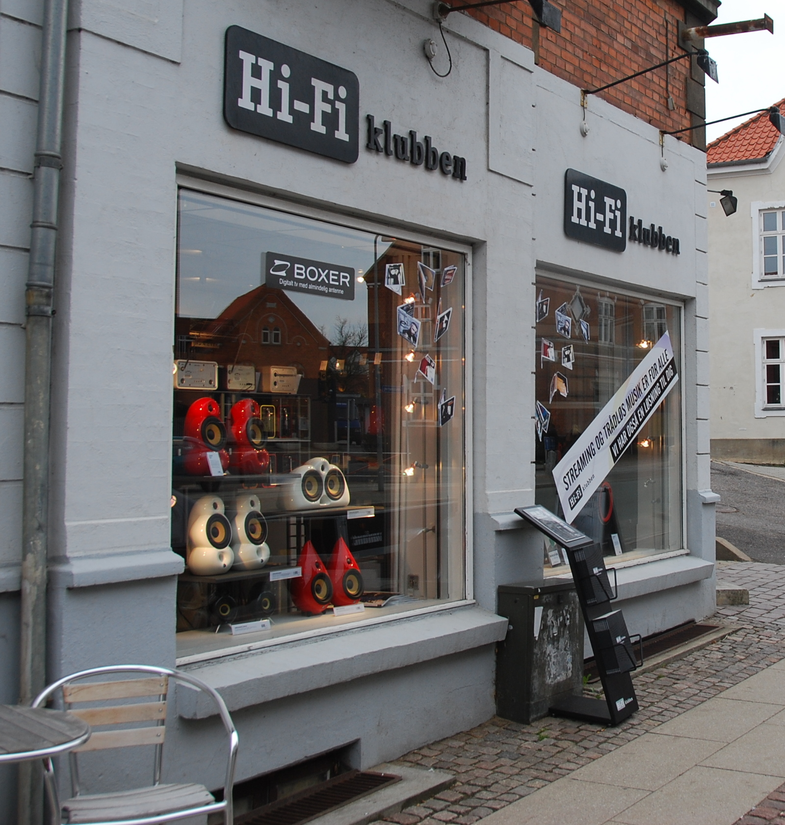 Hi-Fi Klubbens butik i Viborg. Bygningen placeret på Jernbanegade 19 i Viborg, Danmark.